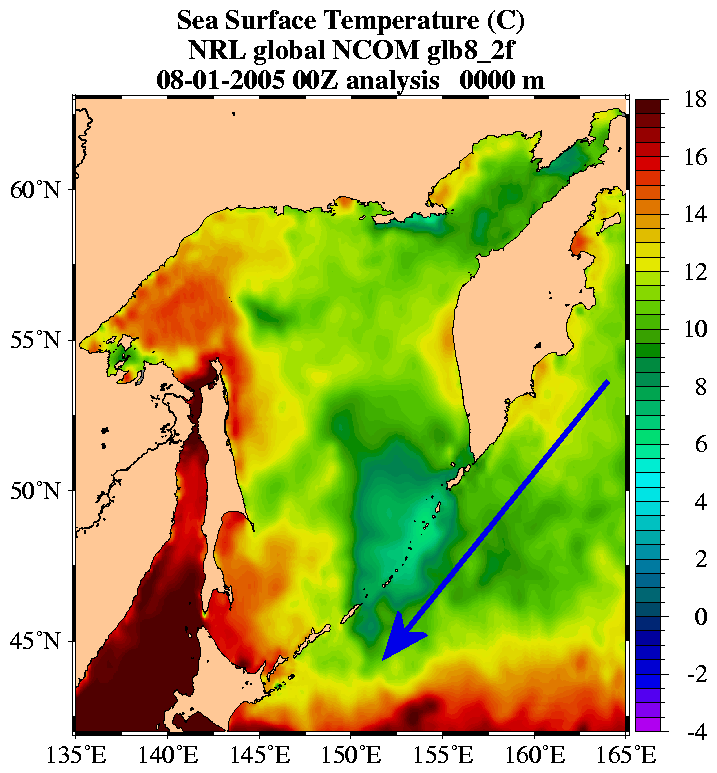 Wassertemperatur des Oyashio am 01. August 2005. Da die Strömung in den Sommermonaten nicht sehr stark ist, fällt der kühlende Effekt vergleichsweise gering aus. Der blaue Pfeil zeigt die Strömungsrichtung des Oyashio an.